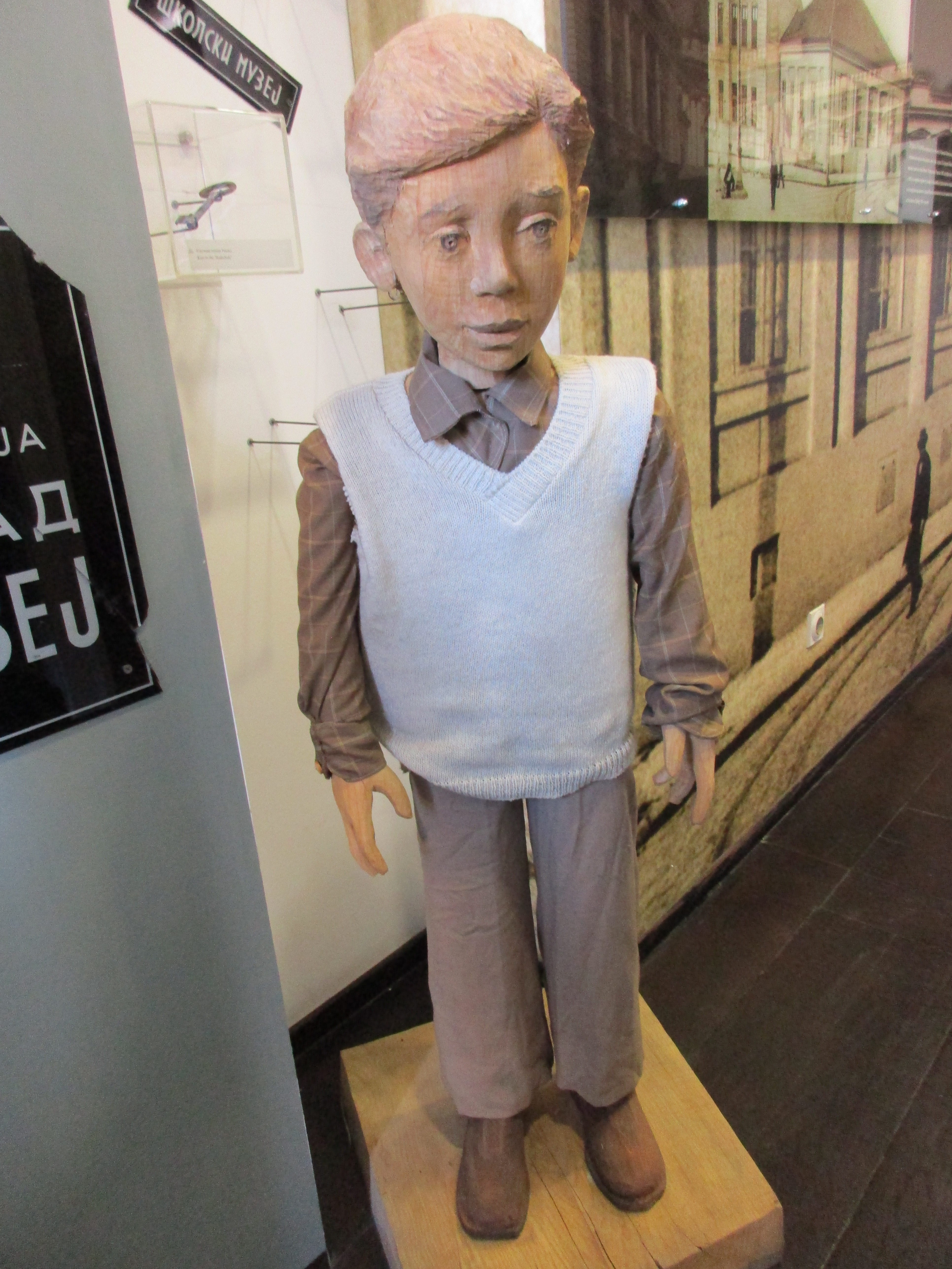 Srpski (latinica): Pedagoški muzej, Beograd